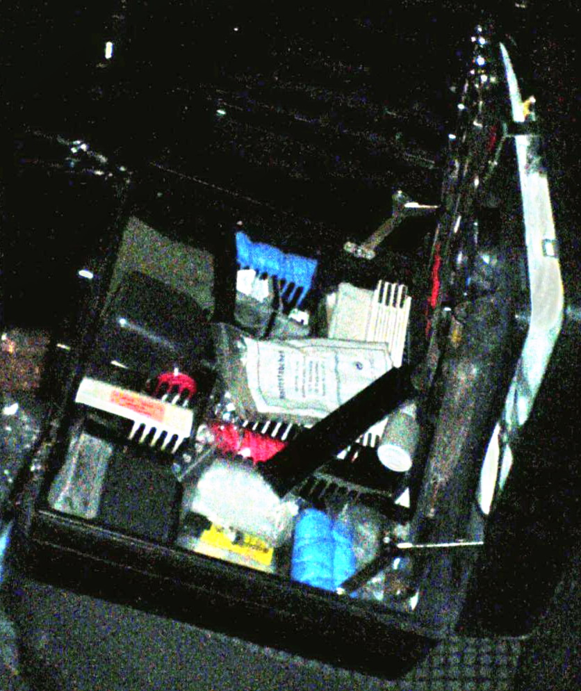 Spurensicherungskoffer der Kriminalpolizei (Polizeipräsidium München)